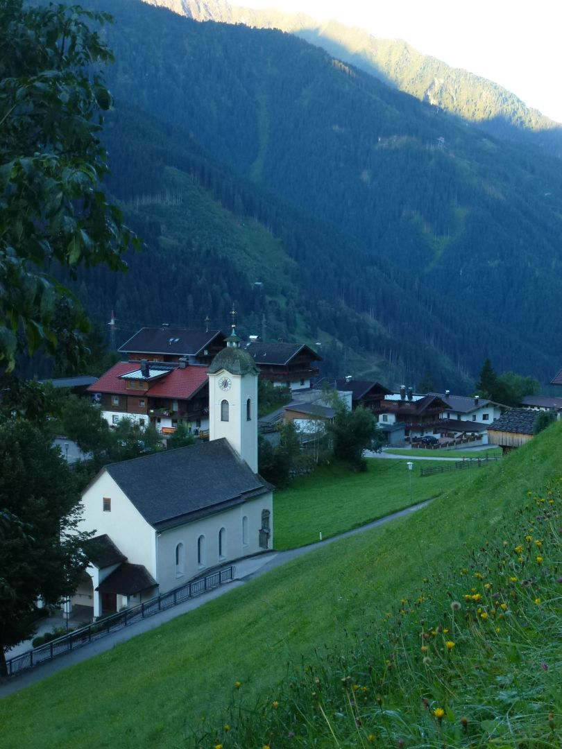 Kirche in brandberg